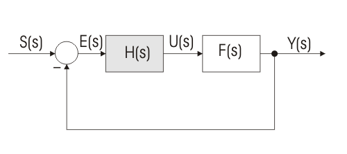 Regulačný obvod